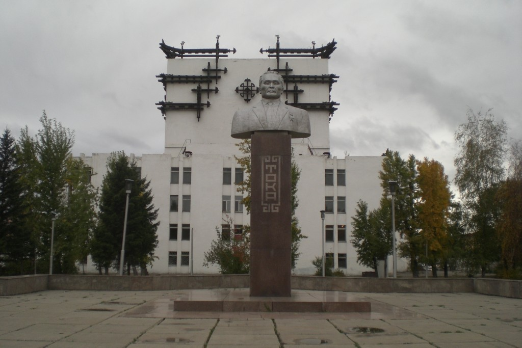 Памятник Салчаку Тока в сквере за Музыкально-Драматическим театром со стороны улицы Тувинских Добровольцев